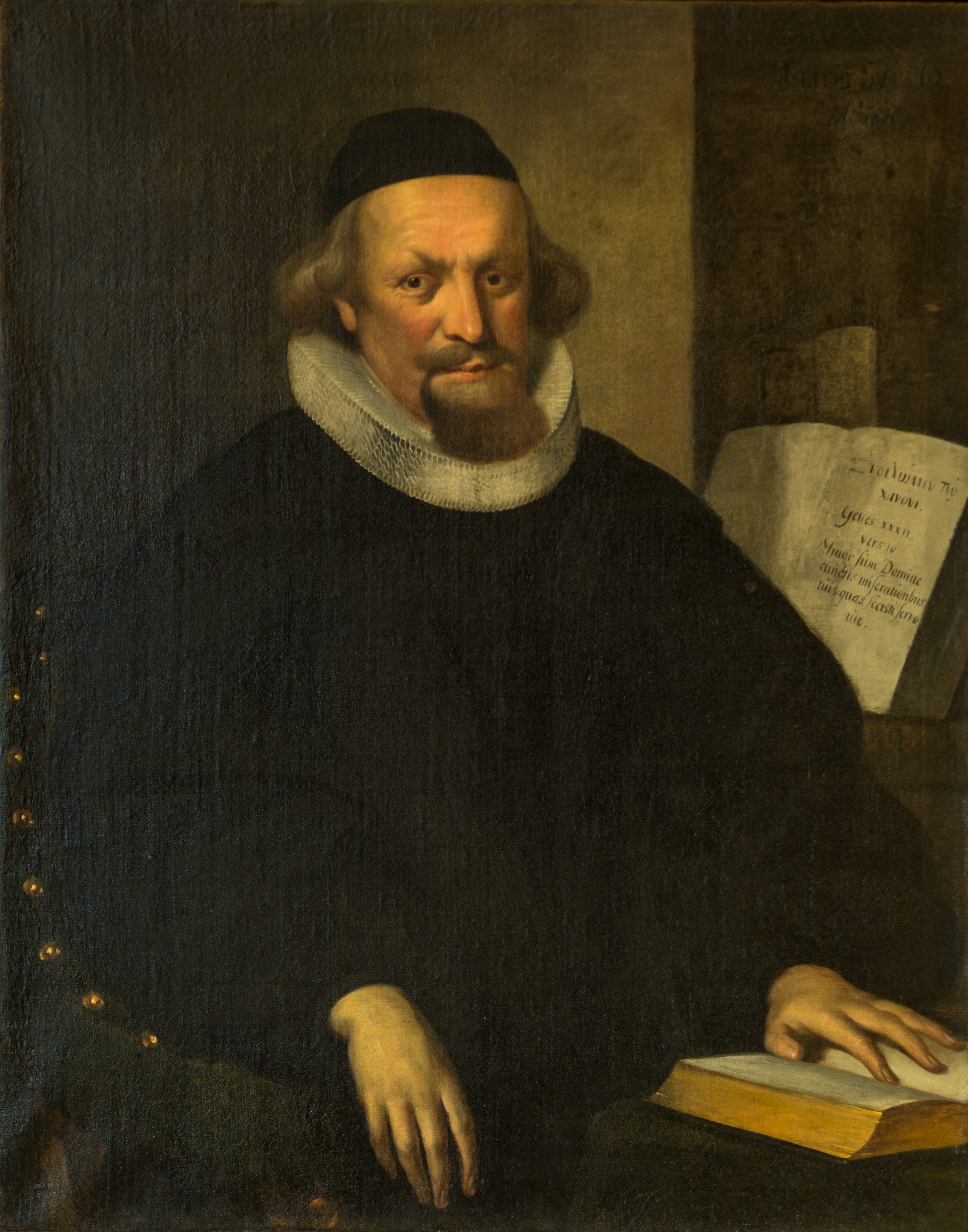 Jean Schmidt (1594-1658). Professeur de théologie. Président du Convent ecclésiastique de Strasbourg. Portrait à l'huile sur toile d'identification ancienne. Collections du Chapitre de Saint-Thomas, Strasbourg, salle Koch